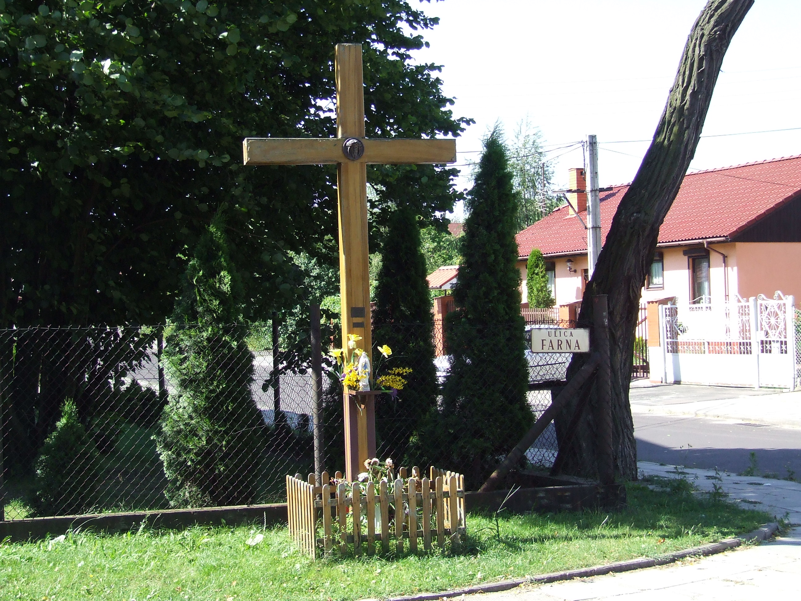 Ulica Farna w Łodzi - krzyż przydrożny Autor:Walther, 2006